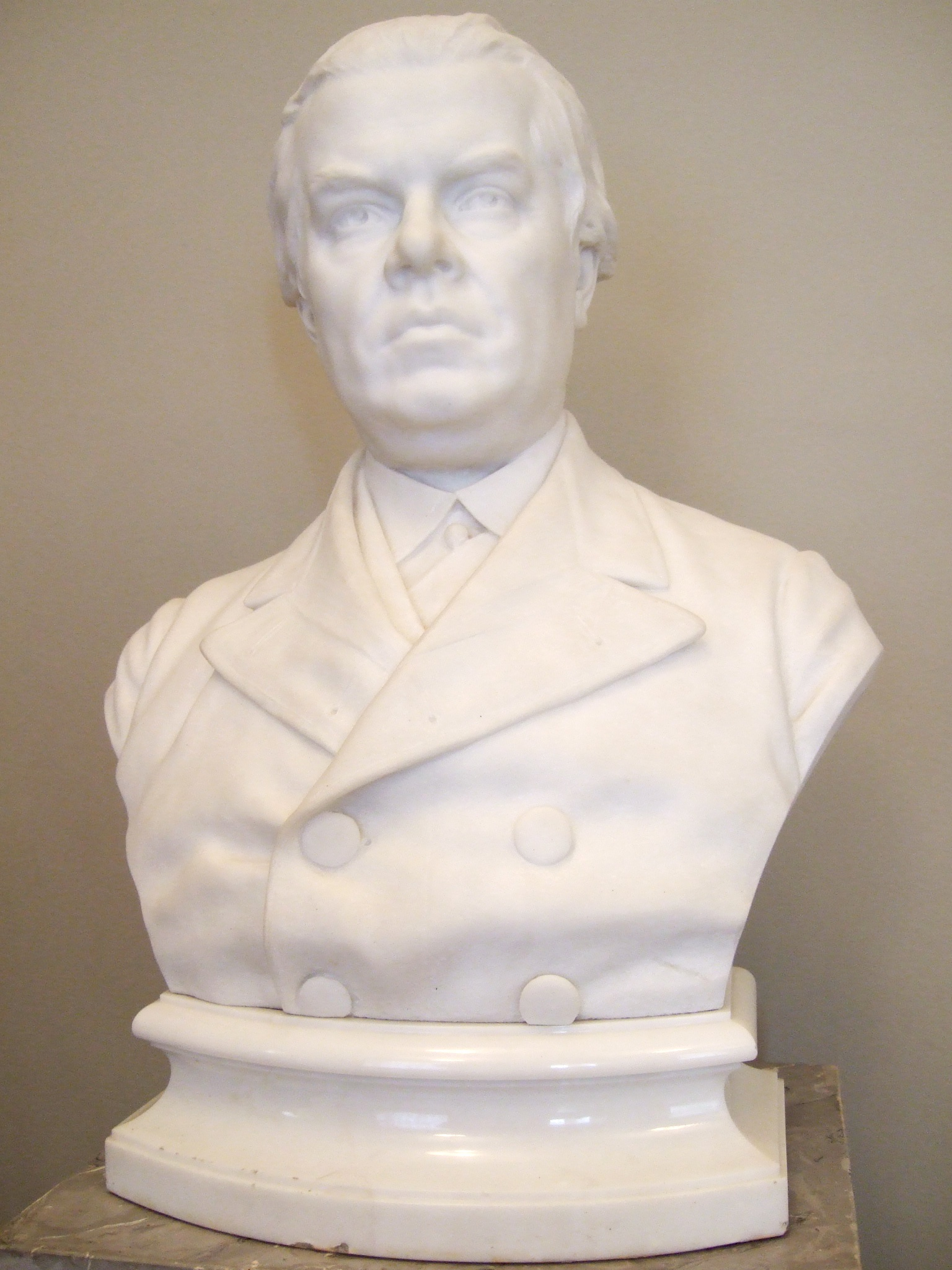 Alexander Polovtsov (Половцов, Александр Александрович)